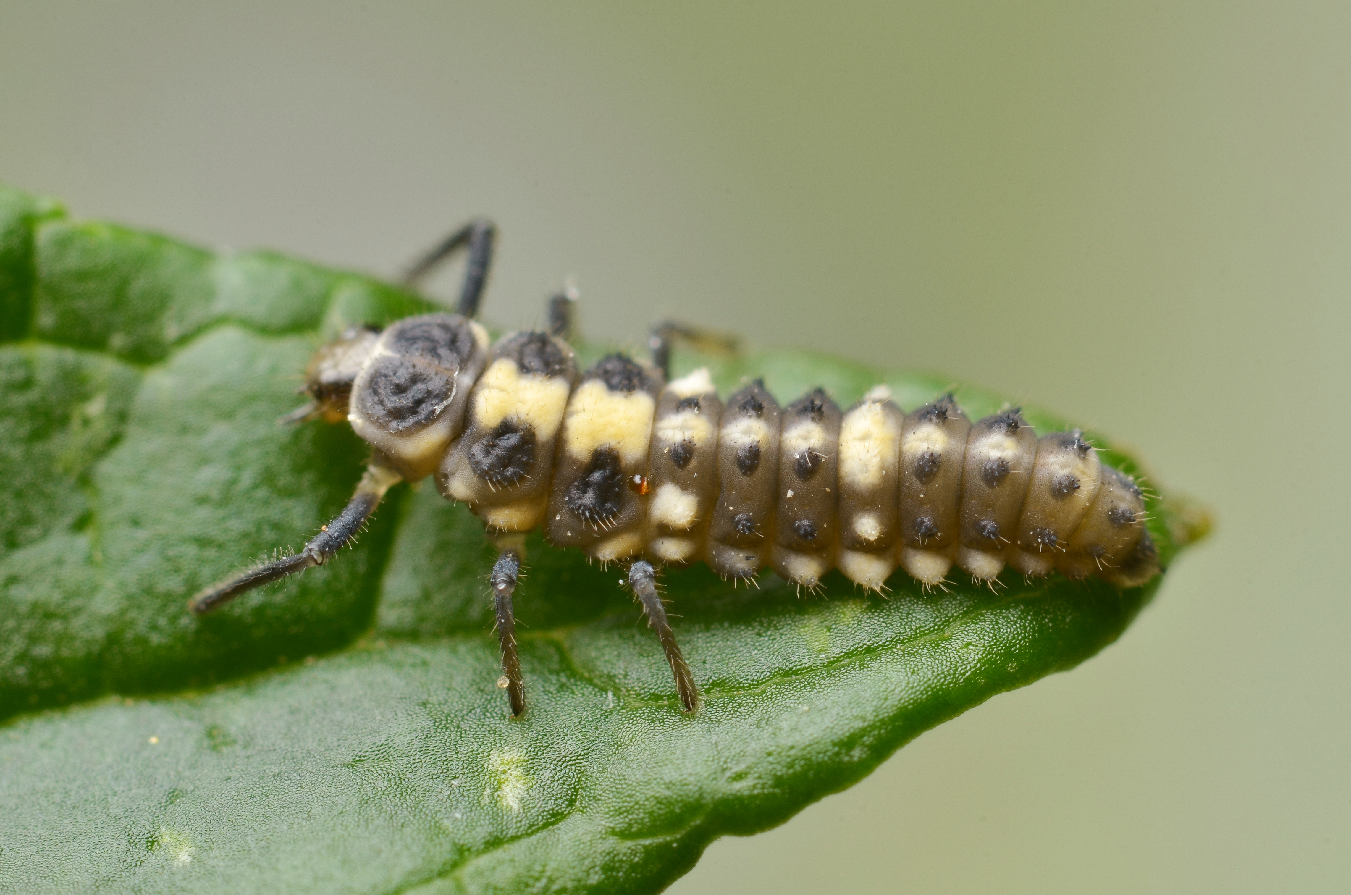 Propylea quatuordecimpunctata larva